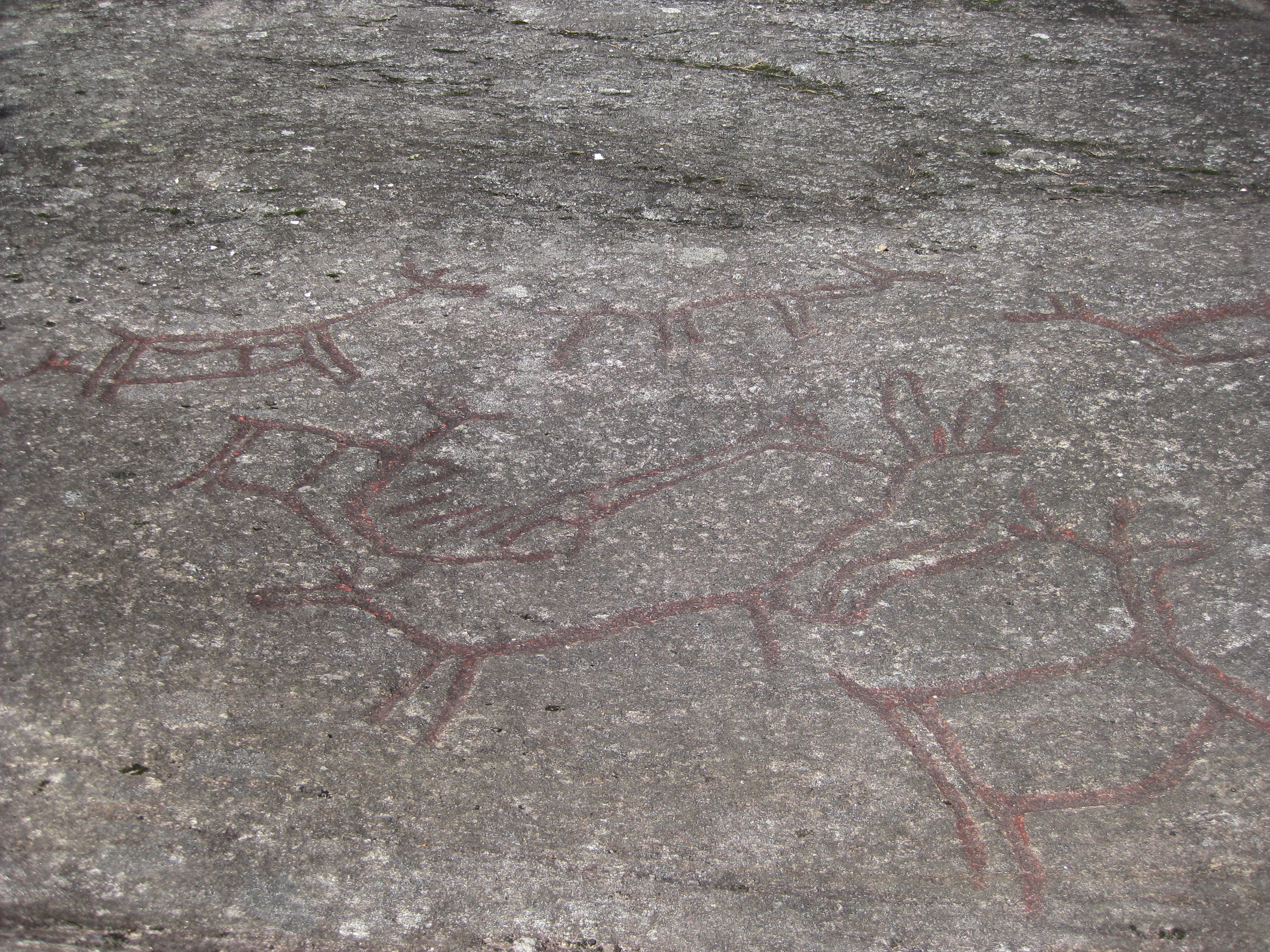 Helleristningene ved Boggestranda.